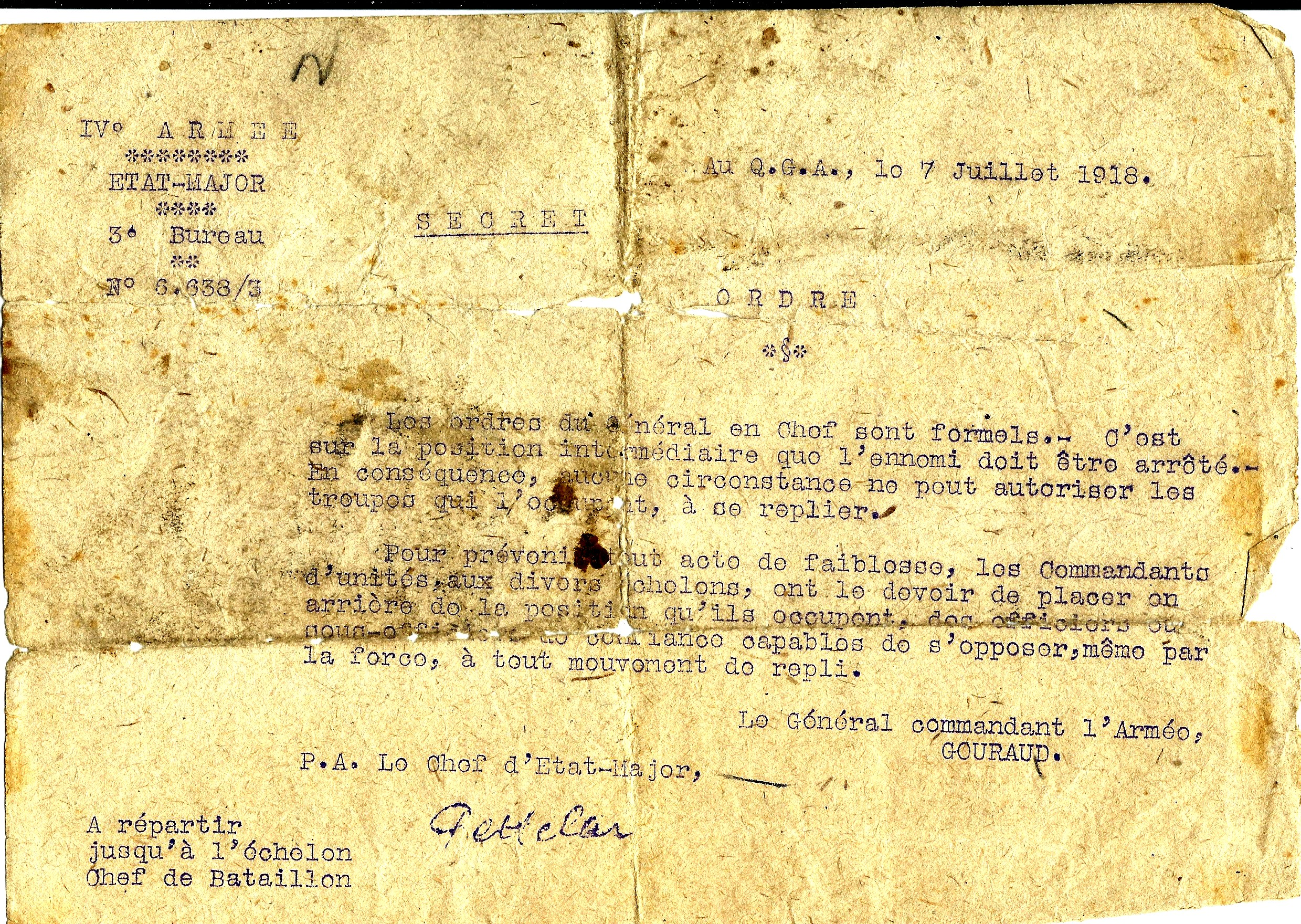 Des officiers et sous-officiers doivent s'opposer par la force à tout mouvement de repli